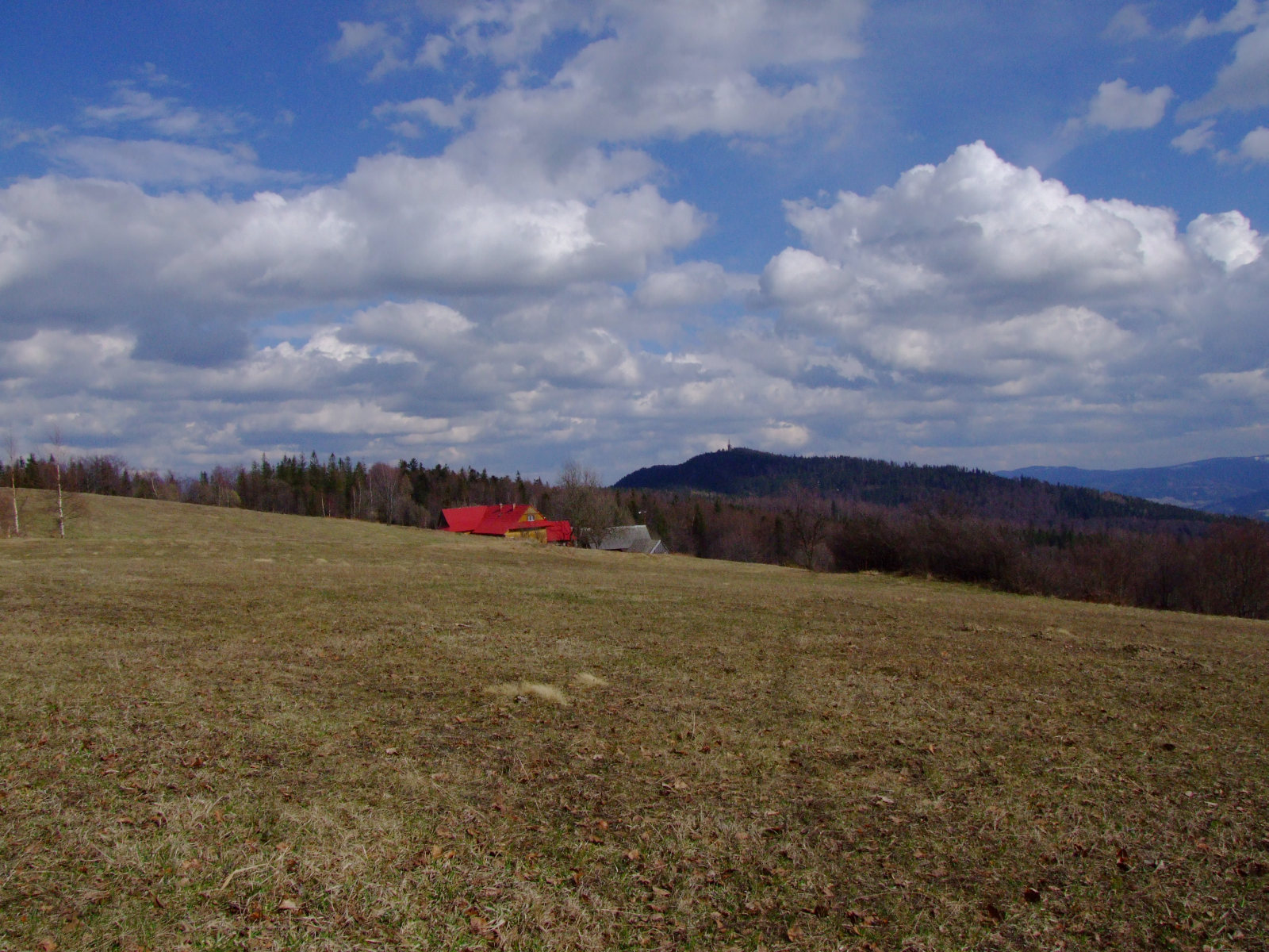 Widok z Polany Surówki na Luboń Wielki